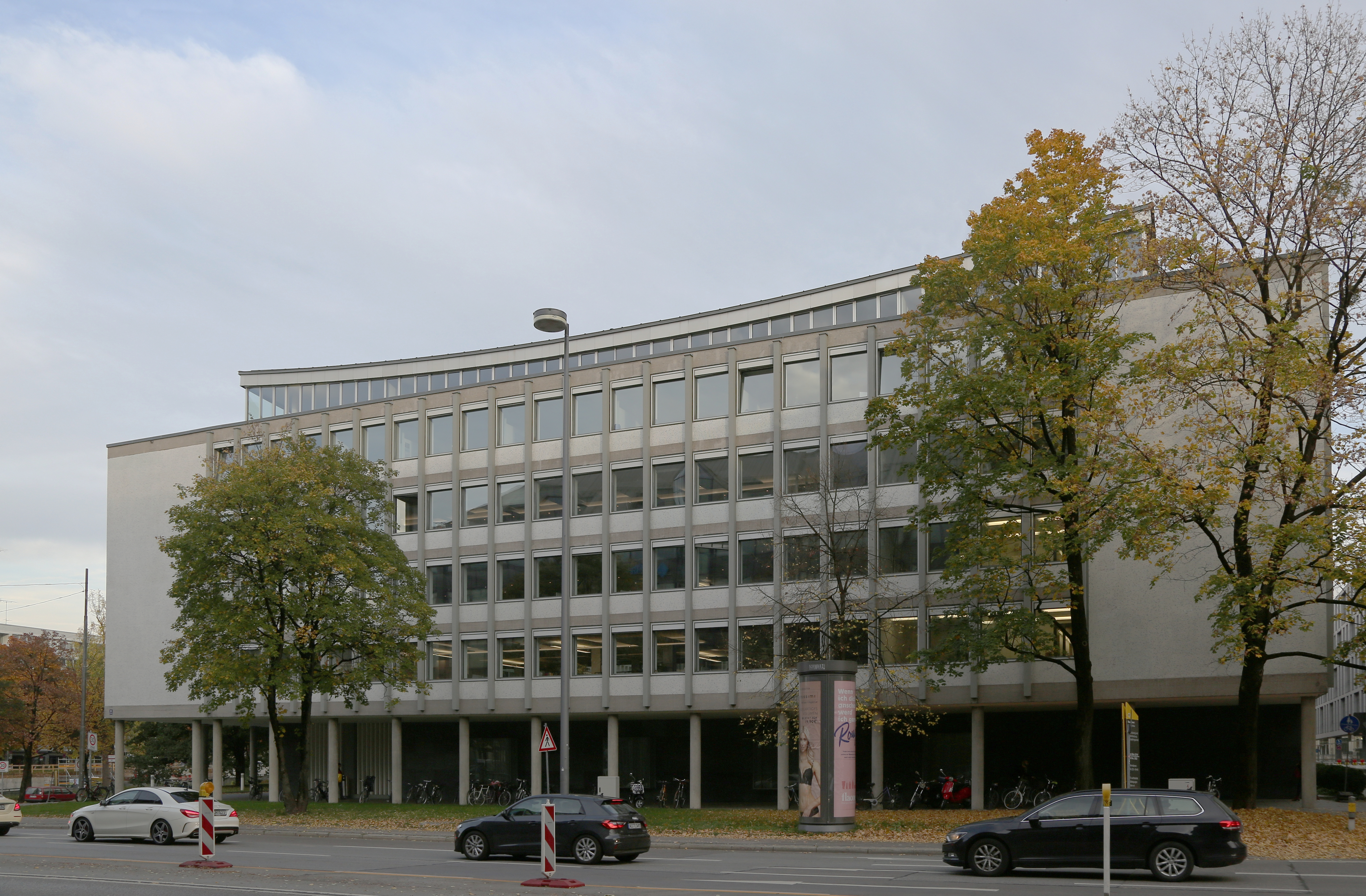 Oskar-von-Miller-Ring 20 , München. Oskar-von-Miller-Ring 18; Verwaltungsgebäude, Stahlbetonskelettbau mit zurückgesetztem fünftem Obergeschoß und konkav geschwungenem Dach in städtebaulicher Ecklage am neu angelegten Oskar-von-Miller- Ring, über quadratischem Grundriss um einen Innenhof errichtet, mit Arkadengänge zur Straße, Fassadengliederung durch vor die Fensterflucht gestellte Stahlbetonpfeiler und in diese sichtbar eingespannte Geschossdecken, Fassadenflächen aus Sichtbeton und weißer Glasmosaikverkleidung, von Eduard von der Lippe und Hans Maurer, 1954–56. Errichtet für die Siemens AG, 2001 renoviert für die MEAG, gemeinsamer Vermögensmanager von Munich Re und ERGO. Seit 2019 Zentrale des Goethe Instituts